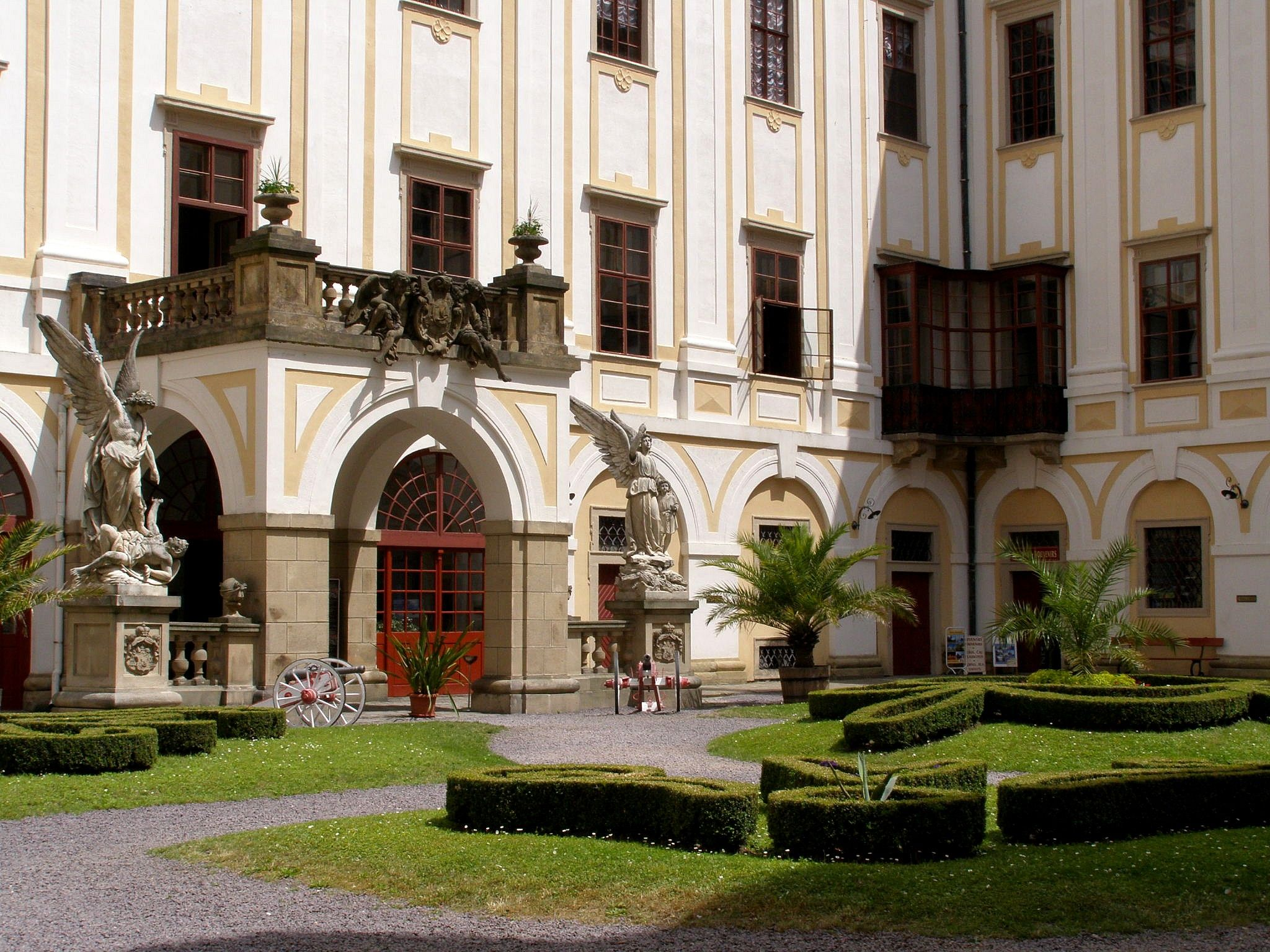 Arcibiskupský zámok v Kroměříži, nádvorie